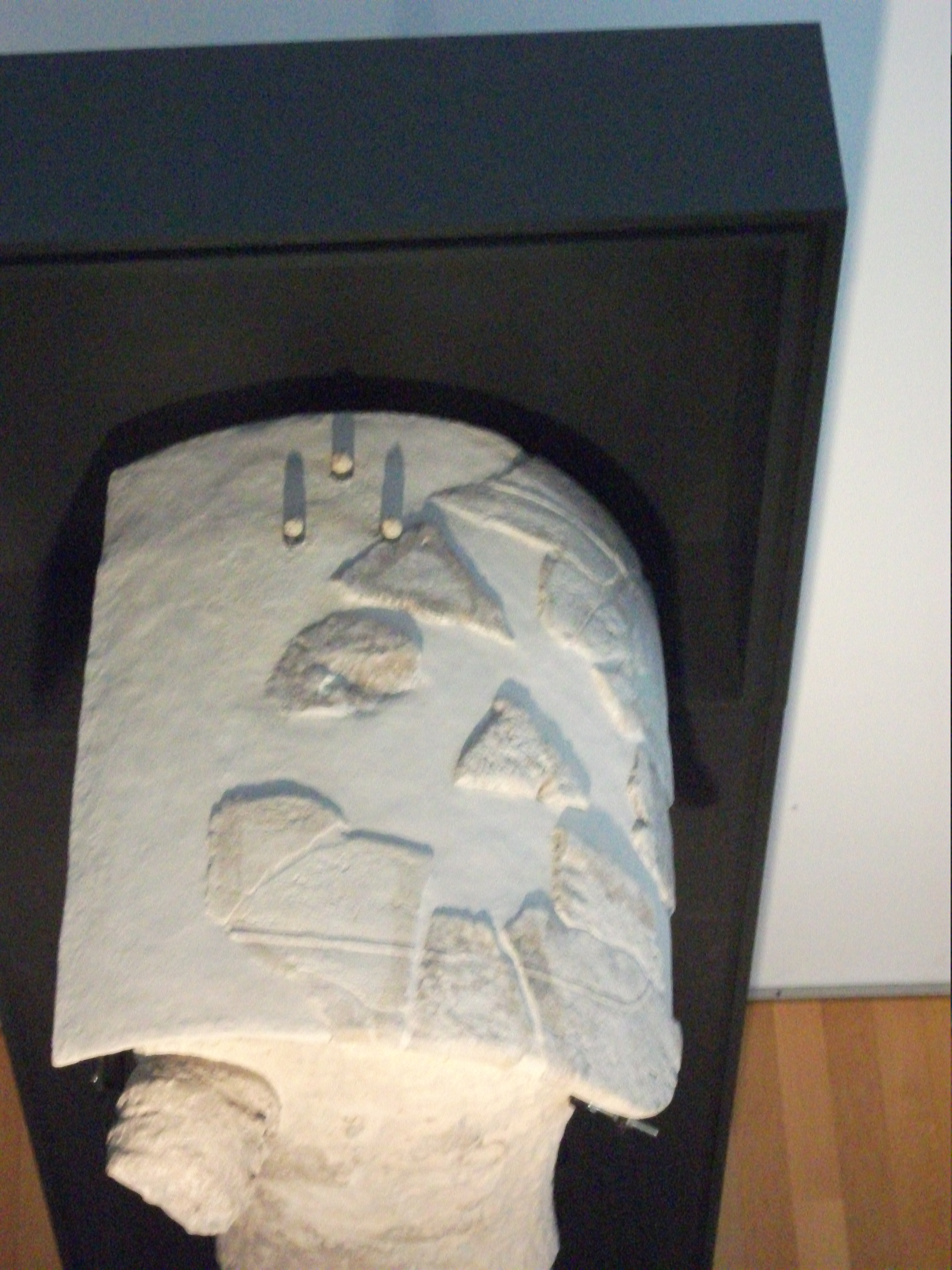 Scultura, Gigante Monte Prama, Pugile, Sinis, Sardegna, Italia civiltà nuragica, preistoria, archeologia, età del bronzoUnknown sculpture, giant of monte prama, boxer, sardinia, italy, nuragic civilization,archaeology, bronze age, sea peoples,prehistory